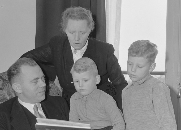 Burgemeester J. Heersink van Steenderen gaat emigreren